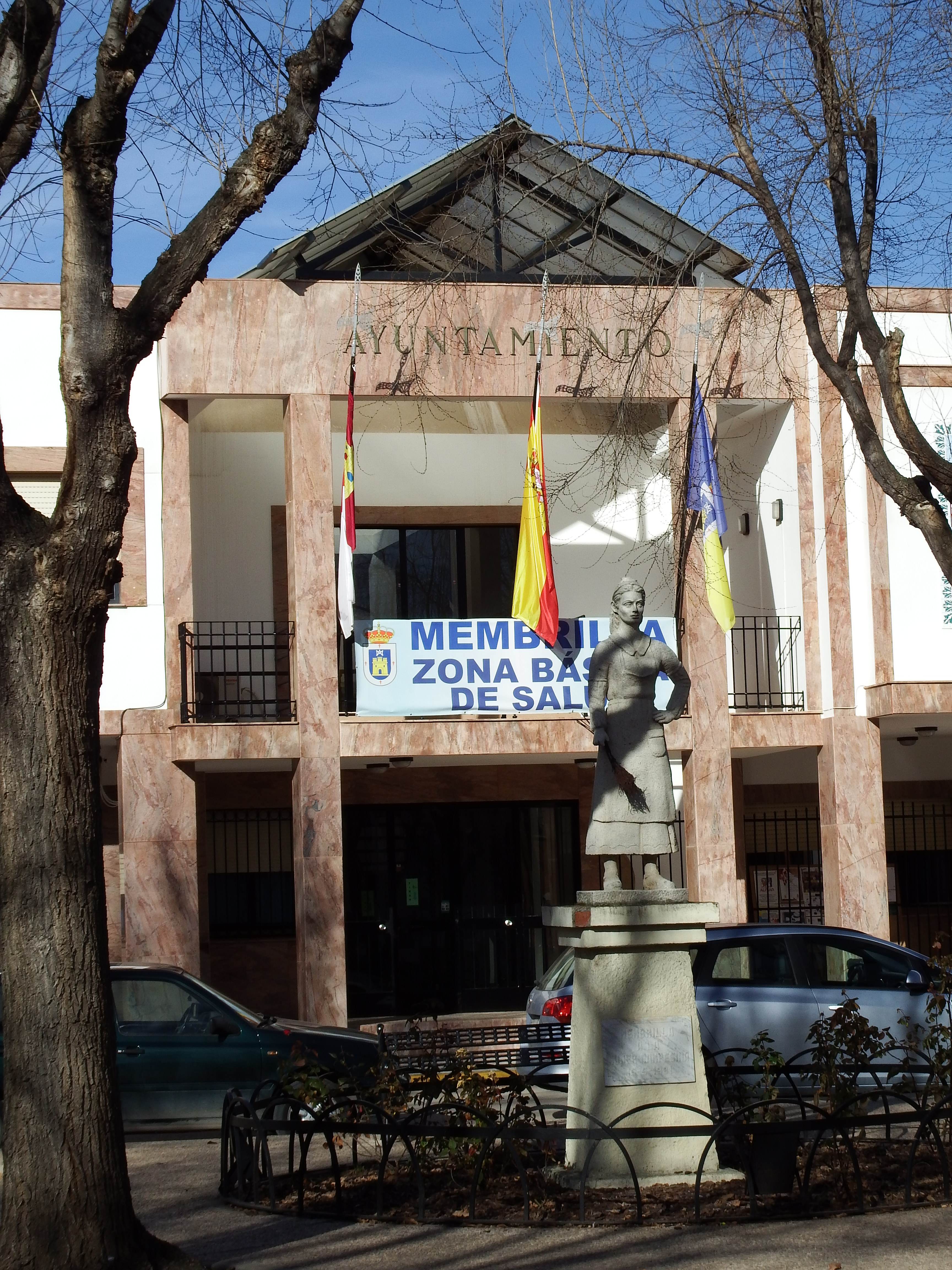 Membrilla